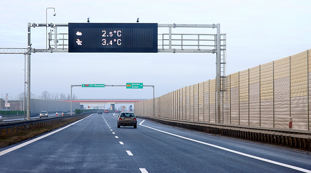 Obwodnica Grójca S7